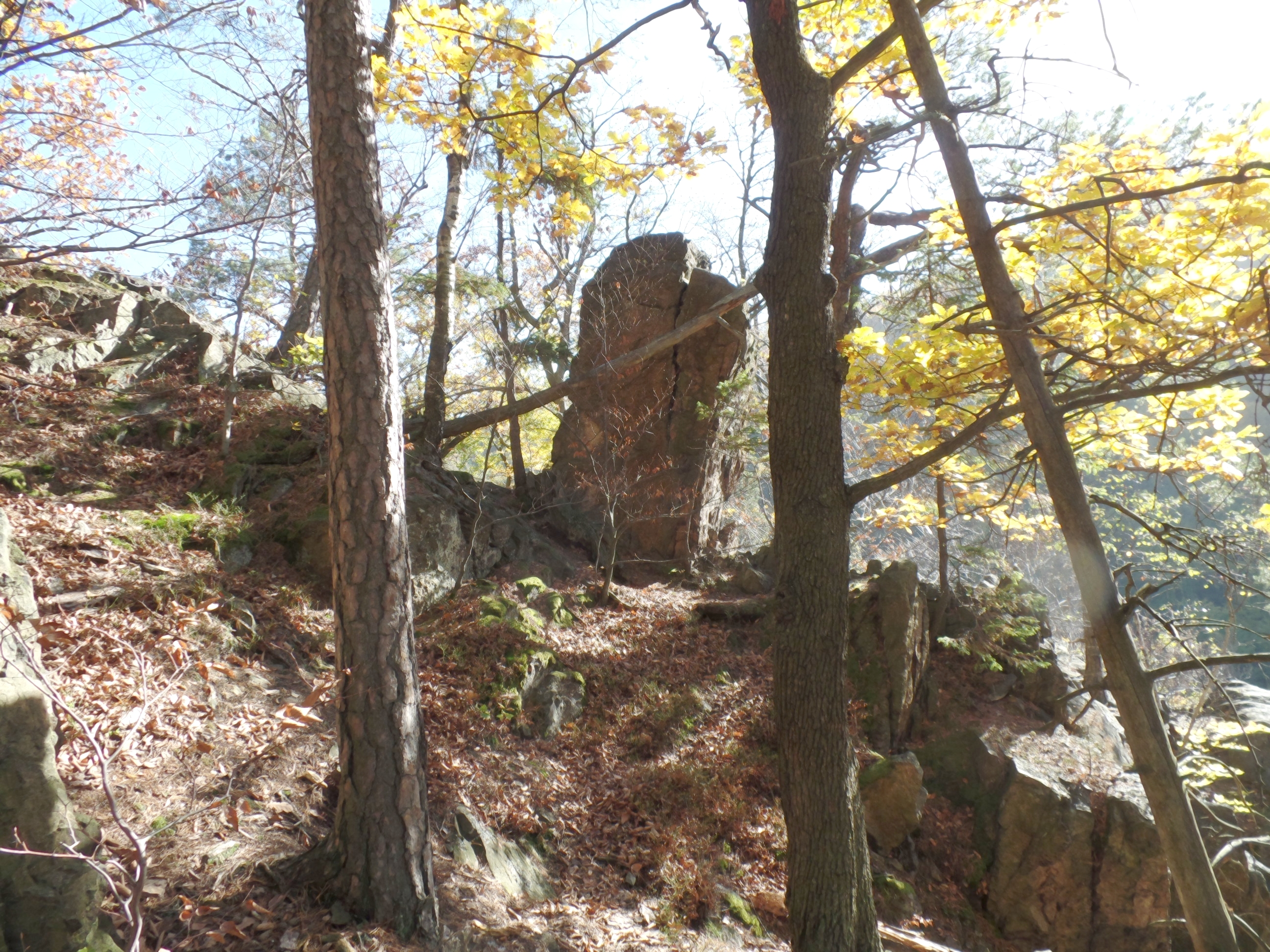 Čertovy kazatelny w Račí údolí Skała Diabelska ambona